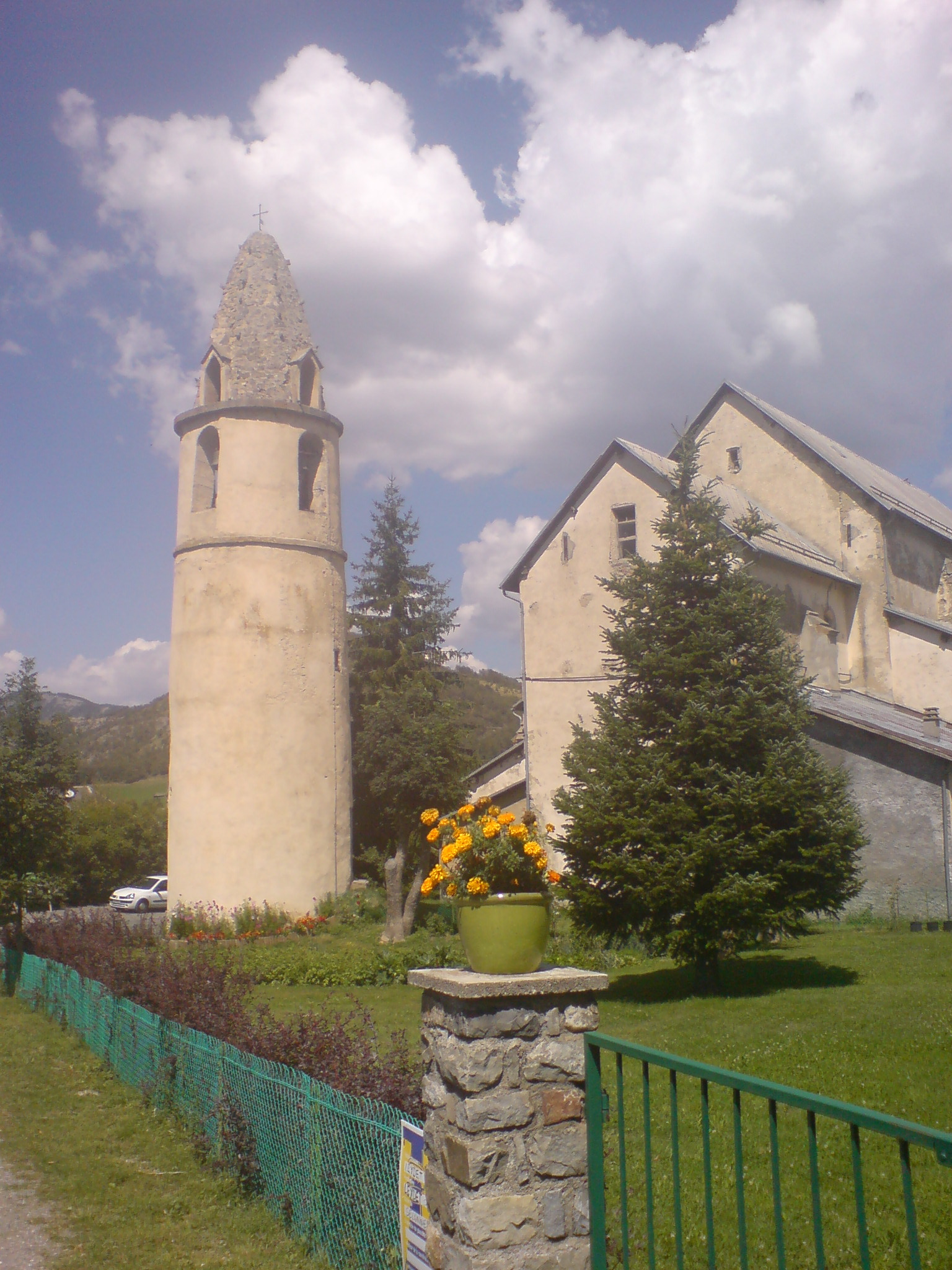 Clocher de l’église de Selonnet, installé dans une tour de l’ancien château des Lesdiguières